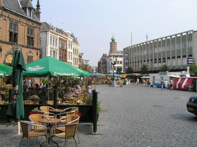 Grote Markt in Nijmegen